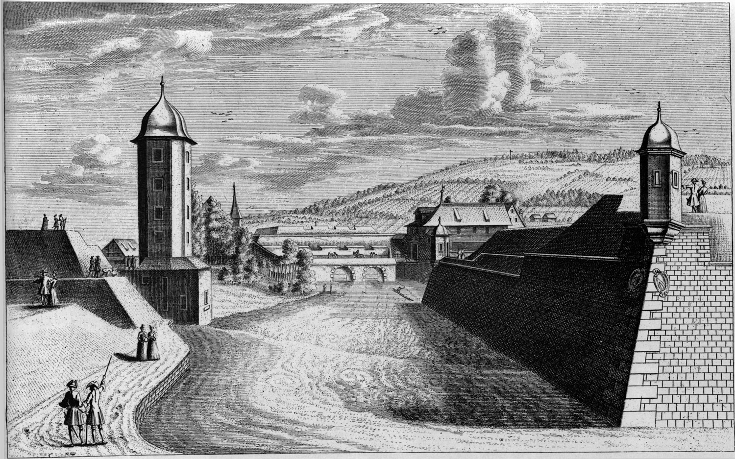 Blick über den Schanzengraben von der Spitze des Bollwerkes "Katz" zur Sihlporte in Zürich ca. 1730. Im Hintergrund das Löwenbollwerk. Stich.